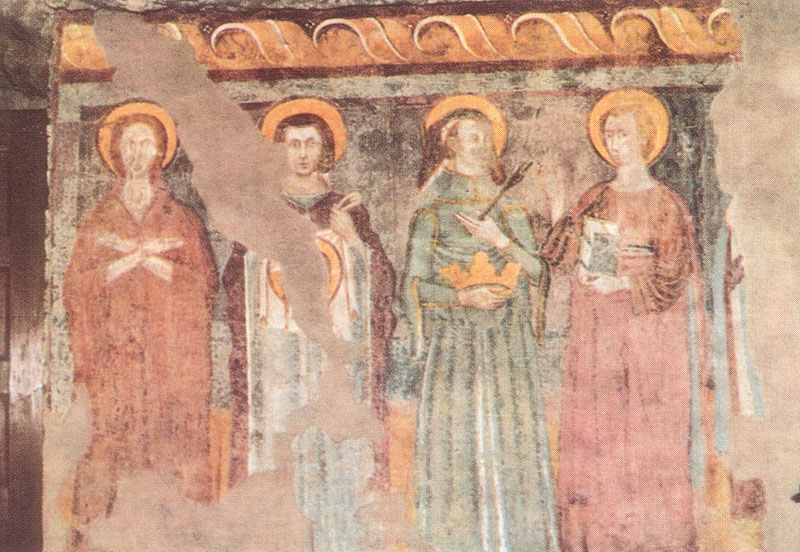 Galliano - Cantù Santa Maria Maddalena, Santa Veronica, Sant'Orsola, San Primo.jpg - affresco della Basilica di San Vincenzo in Galliano